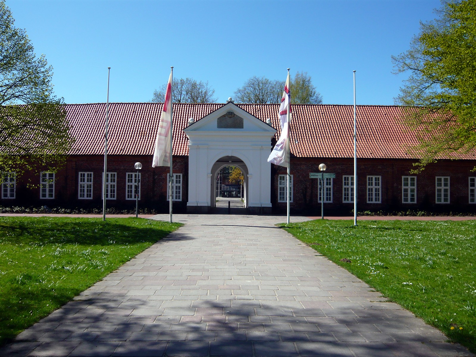 Frontansicht vom Arsenal in Rendsburg. Erbaut 1696-97 (hinterer Teil) und 1740 (vorderer Teil) als Magazin für Waffen und Ausrüstung der Festung. Heute Kulturzentrum der Stadt.